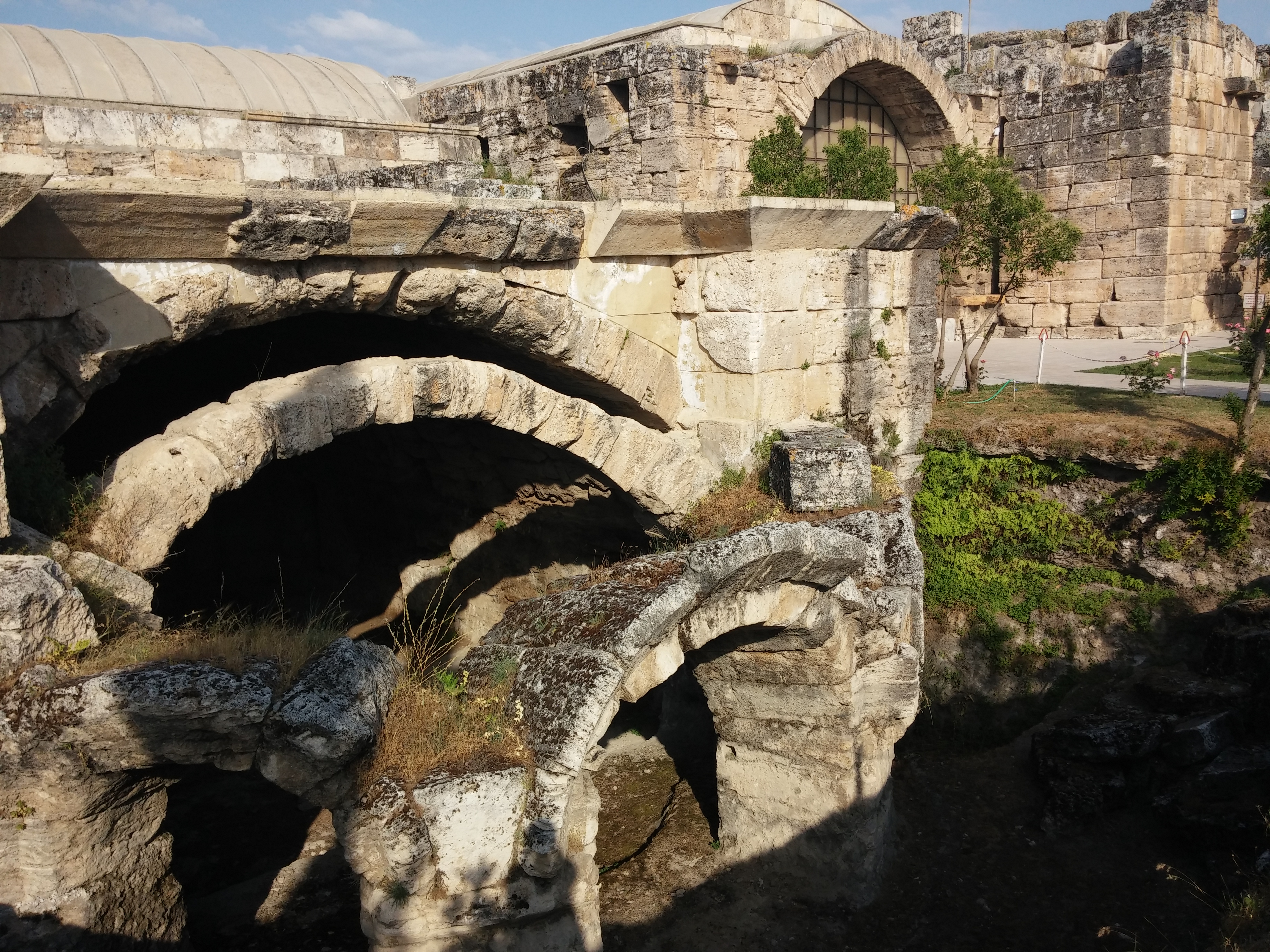 Bir kısmı müze olarak kullanılmakta olan Hierapolis'teki merkezi hamamdan bir görünüm.